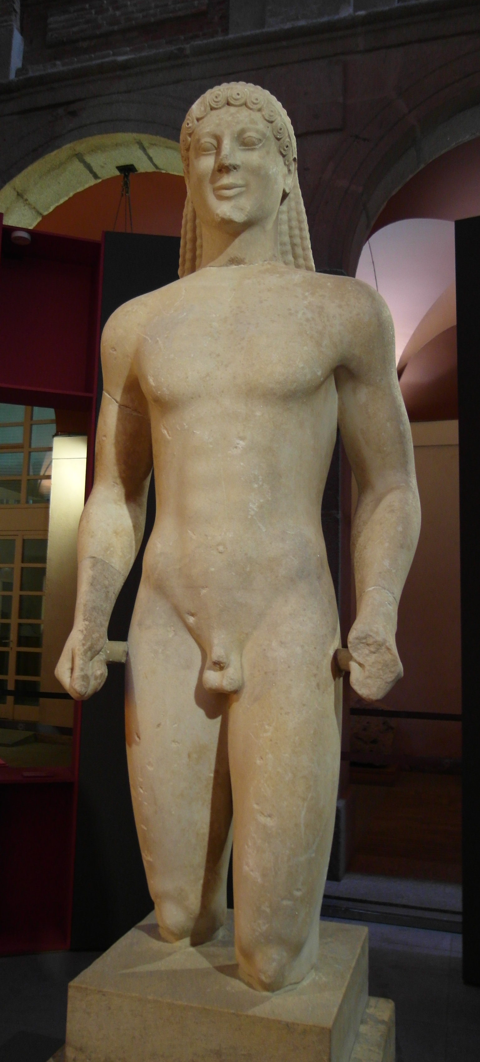 Kouros de mármol del templo de Apolo Ptoios en Beocia, 520 a. de C.